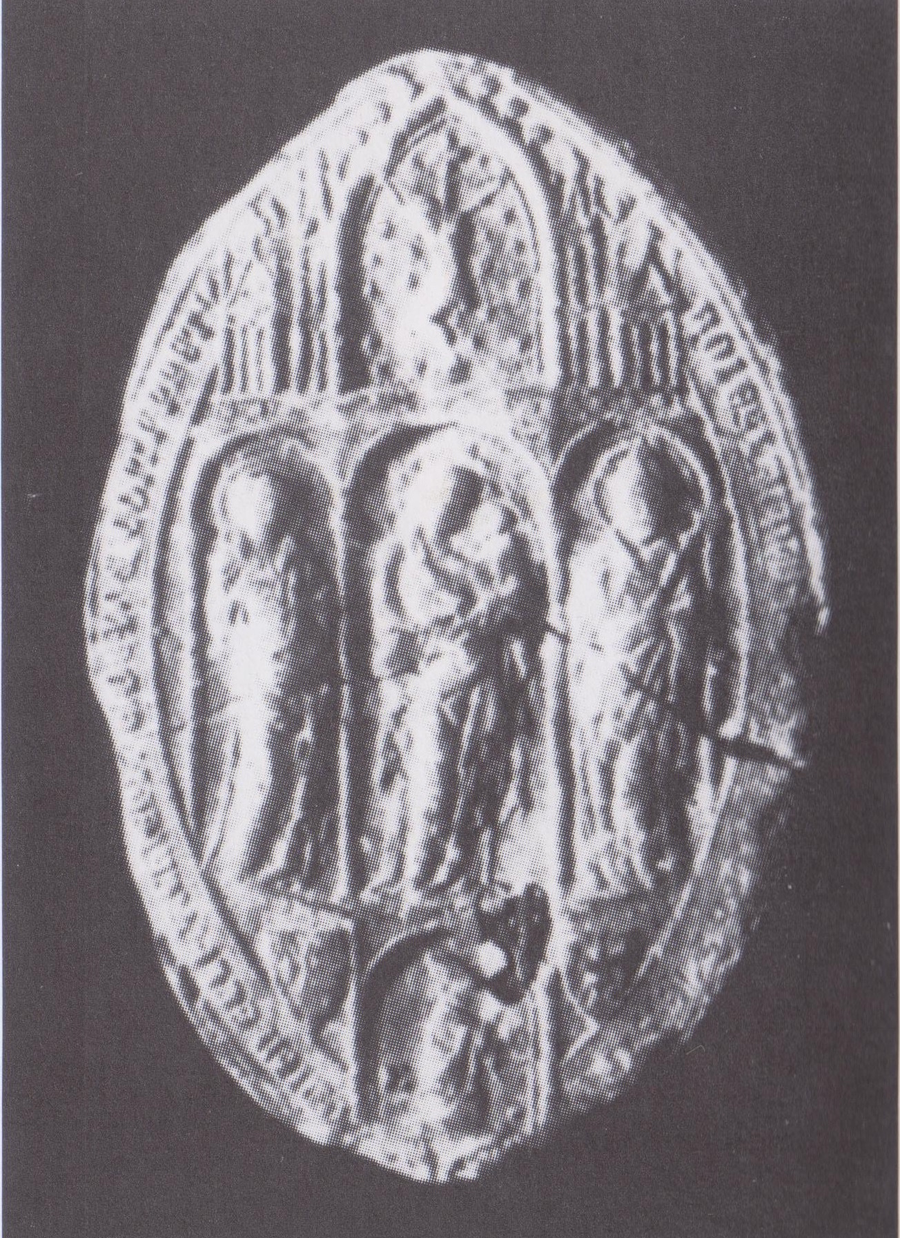 Piast Boleszló esztergomi érsek pecsétje